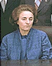 Elena Ceausescu